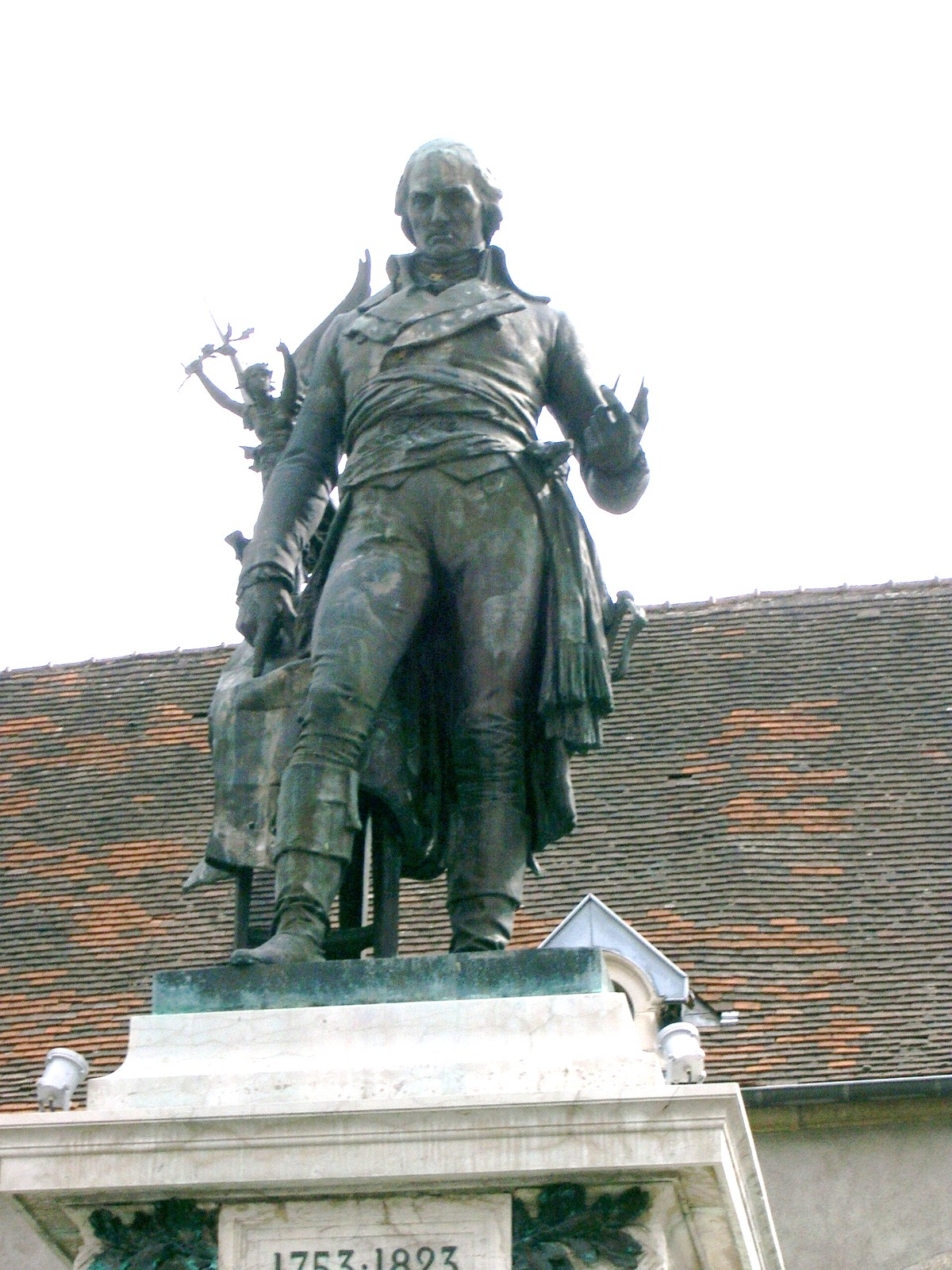 Nolay (21) - statue de Lazare Carnot né à Nolay en 1753